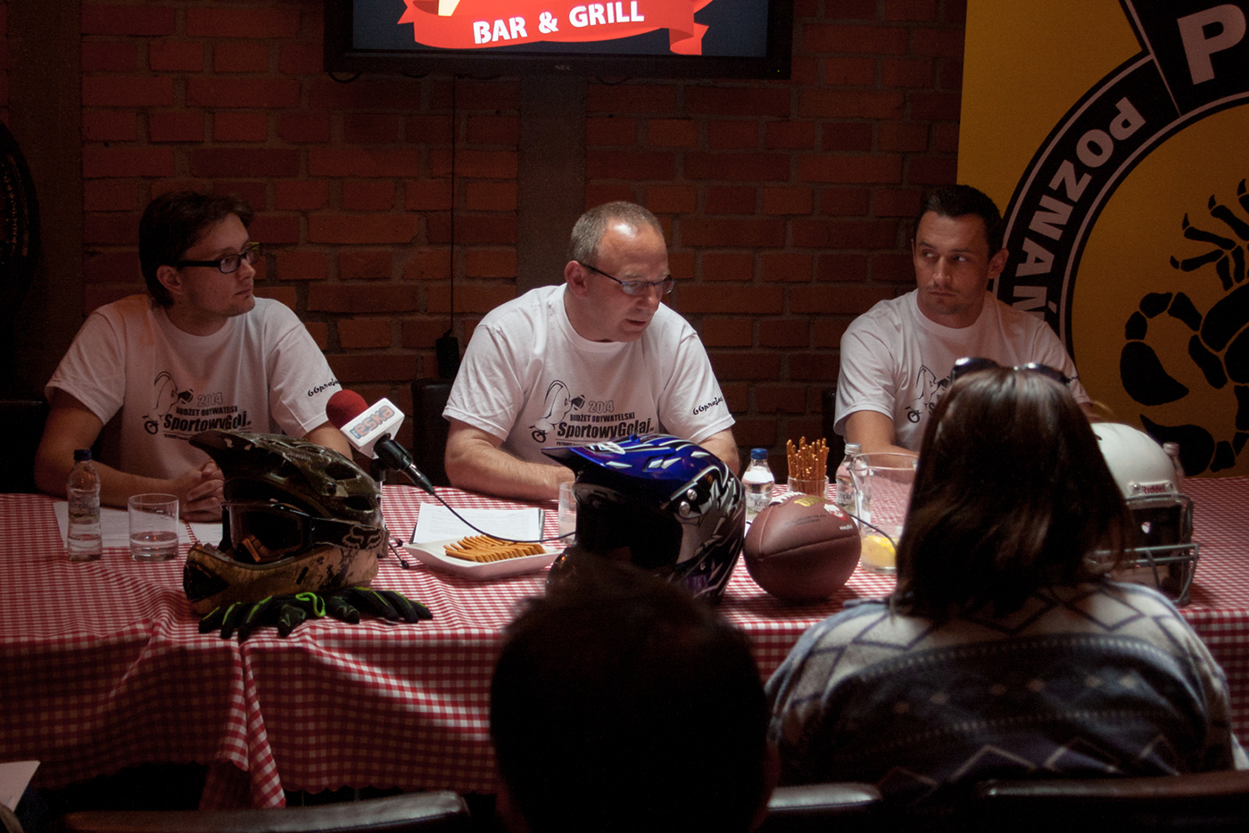 Konferencja prasowa podczas której zostało podpisane porozumienie Sportowy Golaj zawarte między stowarzyszeniami Patrioci Poznań (futbol amerykański) PSŻ (żużel) i ProLans X4 (kolarstwo grawitacyjne) dotyczące rewitalizacji Stadionu na Golęcinie (Poznań).